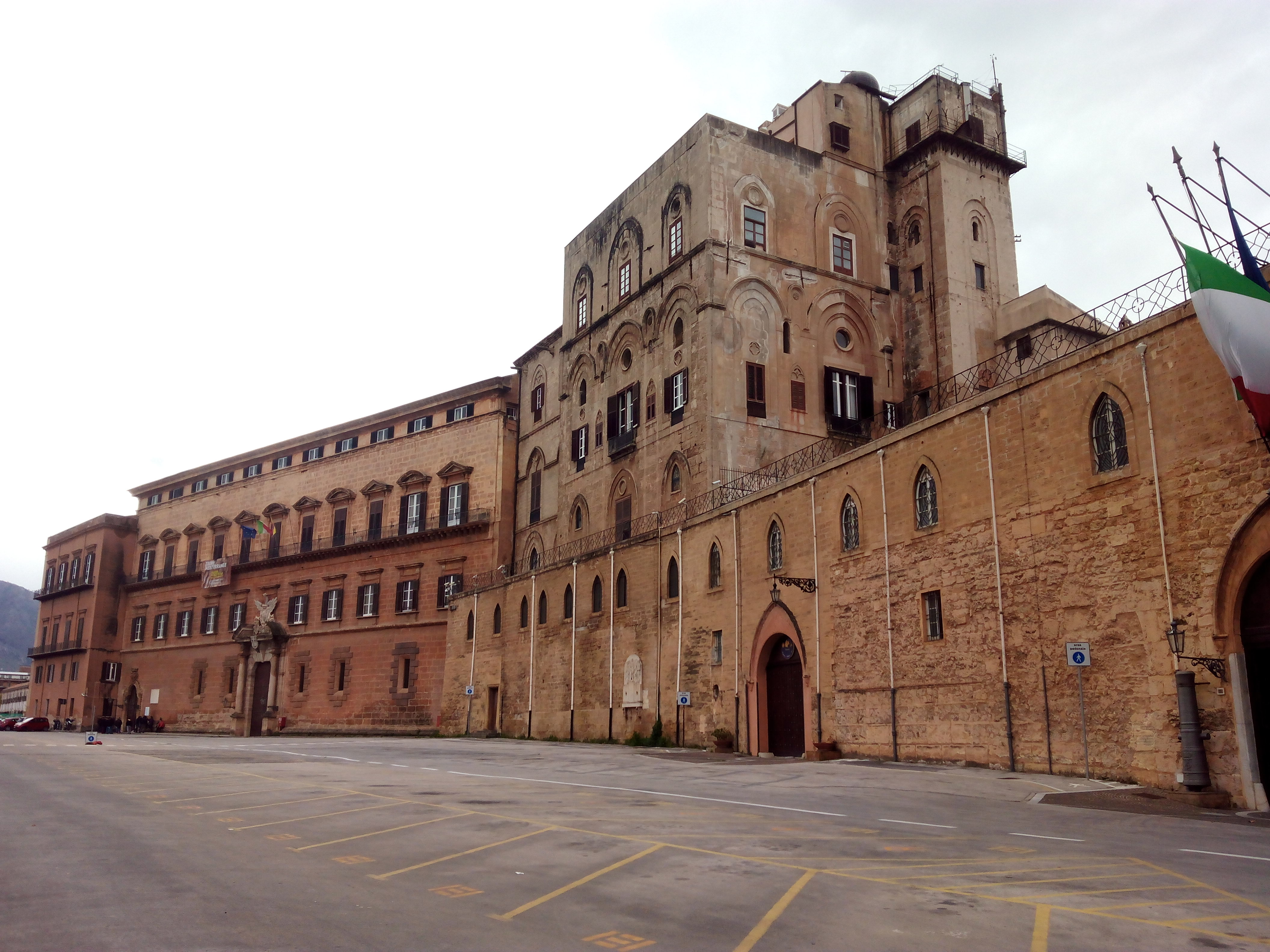 Normandiarren gaztelua